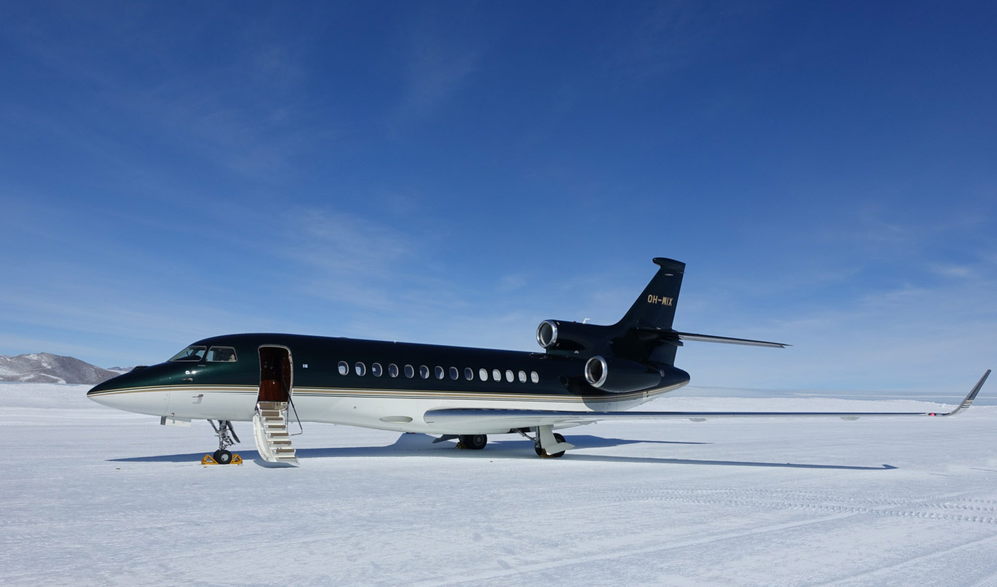 Jetflite Dassault Falcon 7X -lentokone Etelämantereella